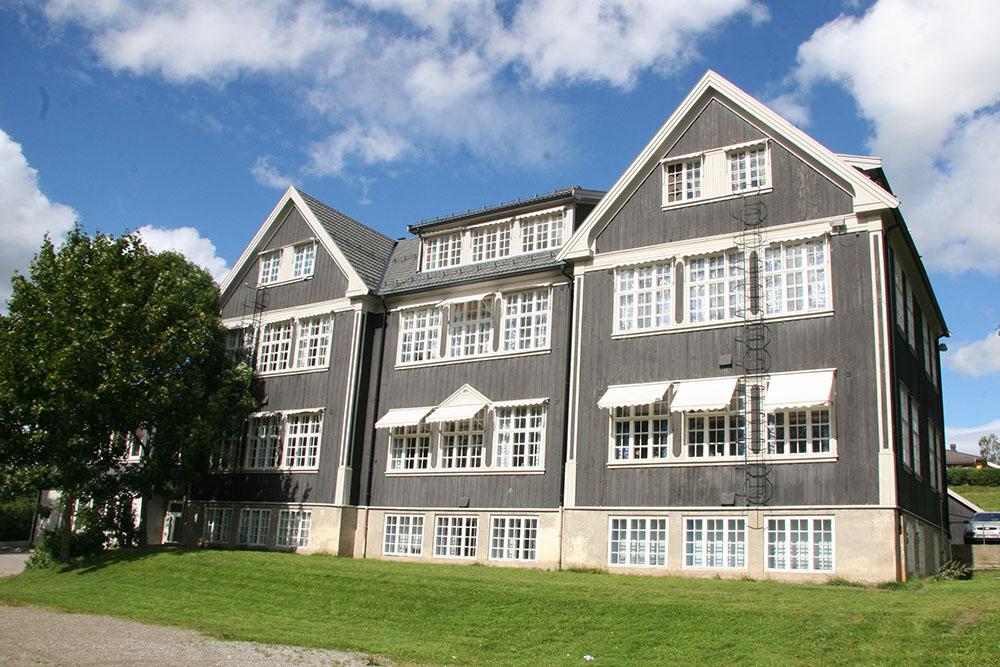 Vilberg skole 2007